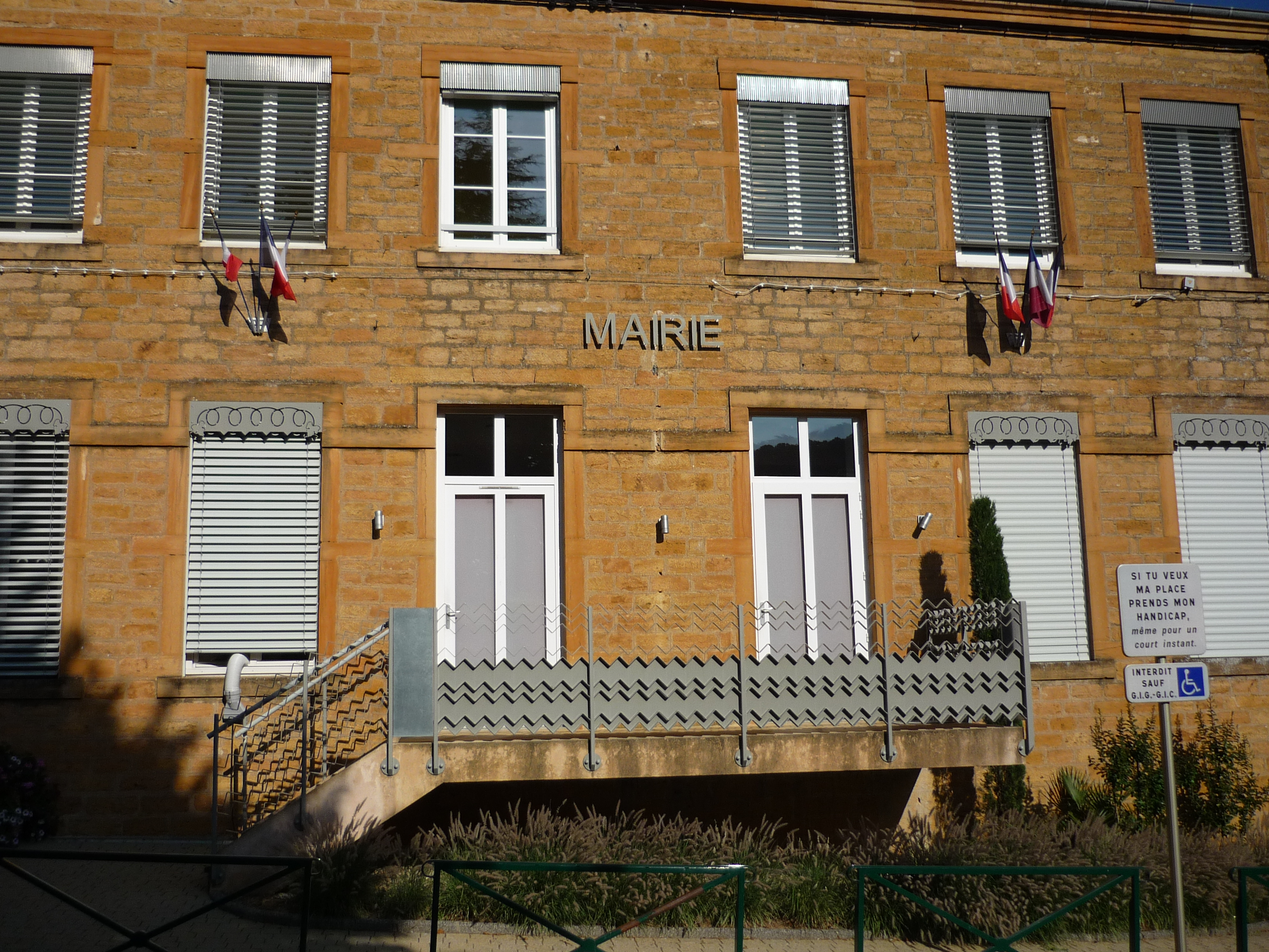 Mairie de Cogny dans le Rhône